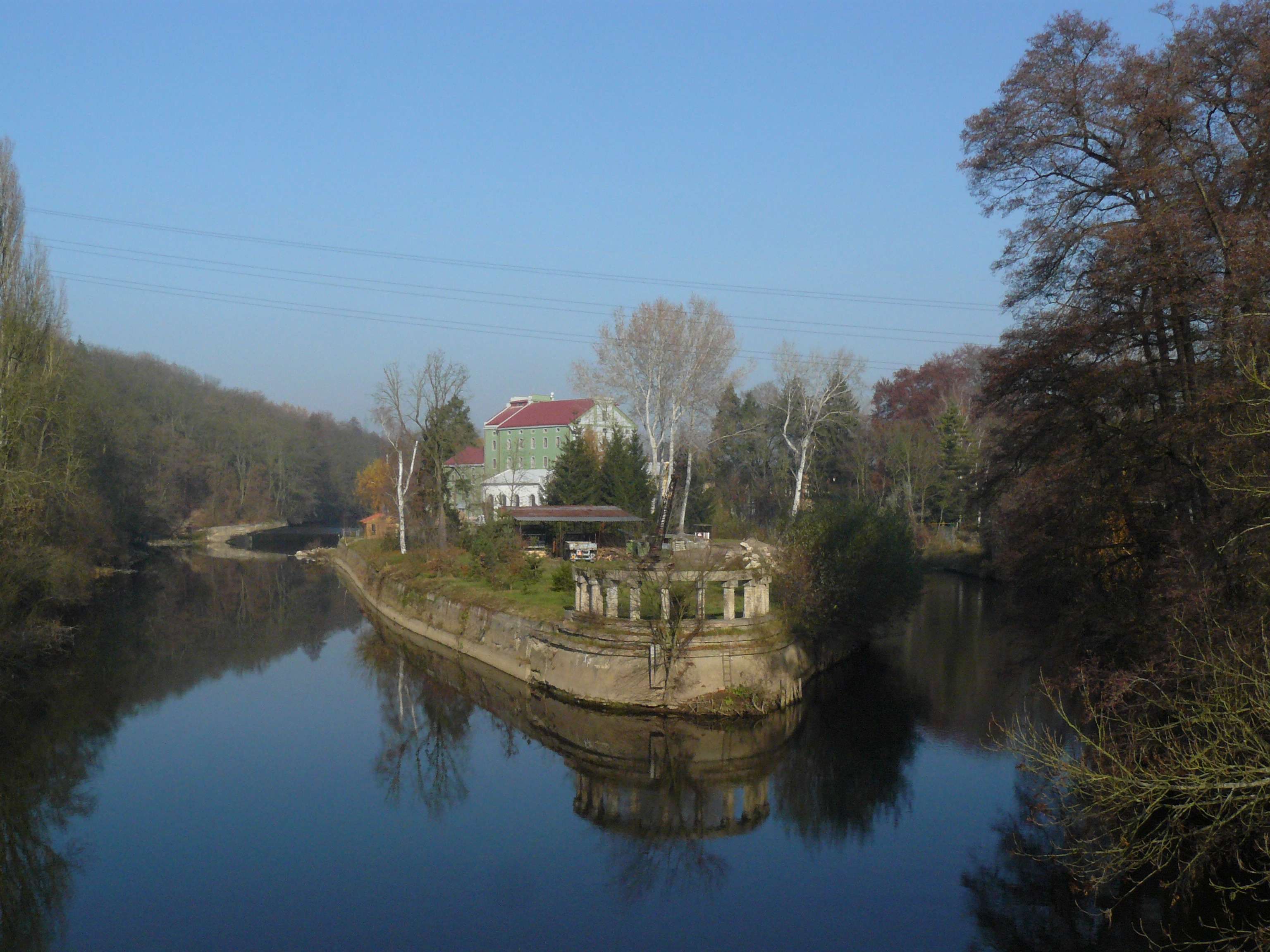 Dražice (Benátky nad Jizerou)